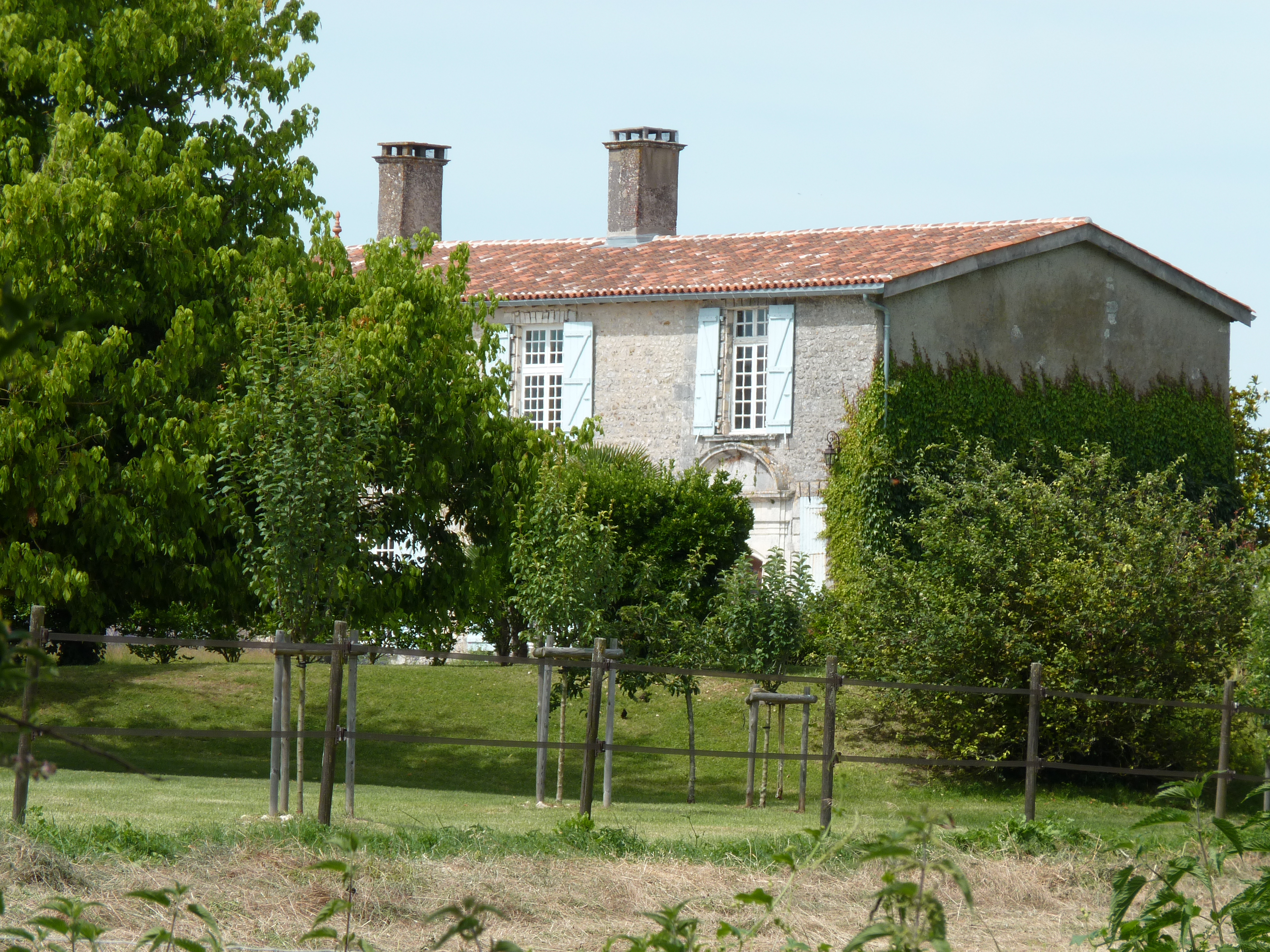 Vue sur le Chateau de Mornac-sur-Seudre